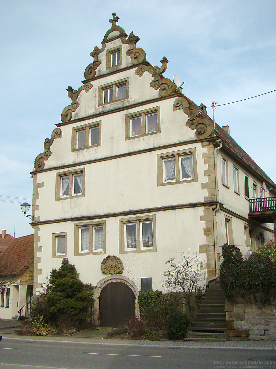 Chanowskysches Schhlösschen in Langenbrettach-Brettach